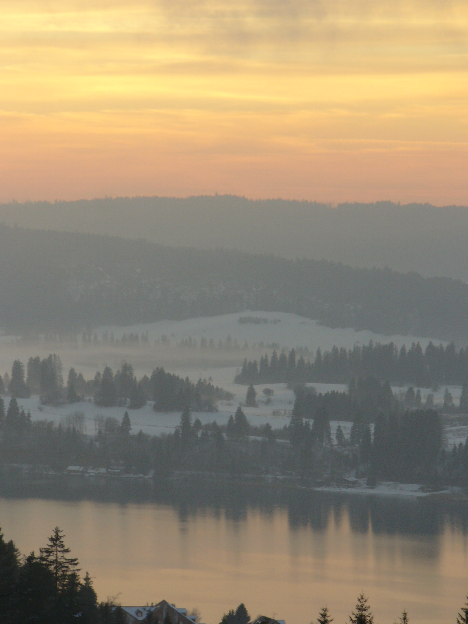 Summary Auteur: Utilisateur:Suaudeau Description: Vue du lac de Saint-Point au coucher du soleil en hiver depuis la rive droite. Licensing